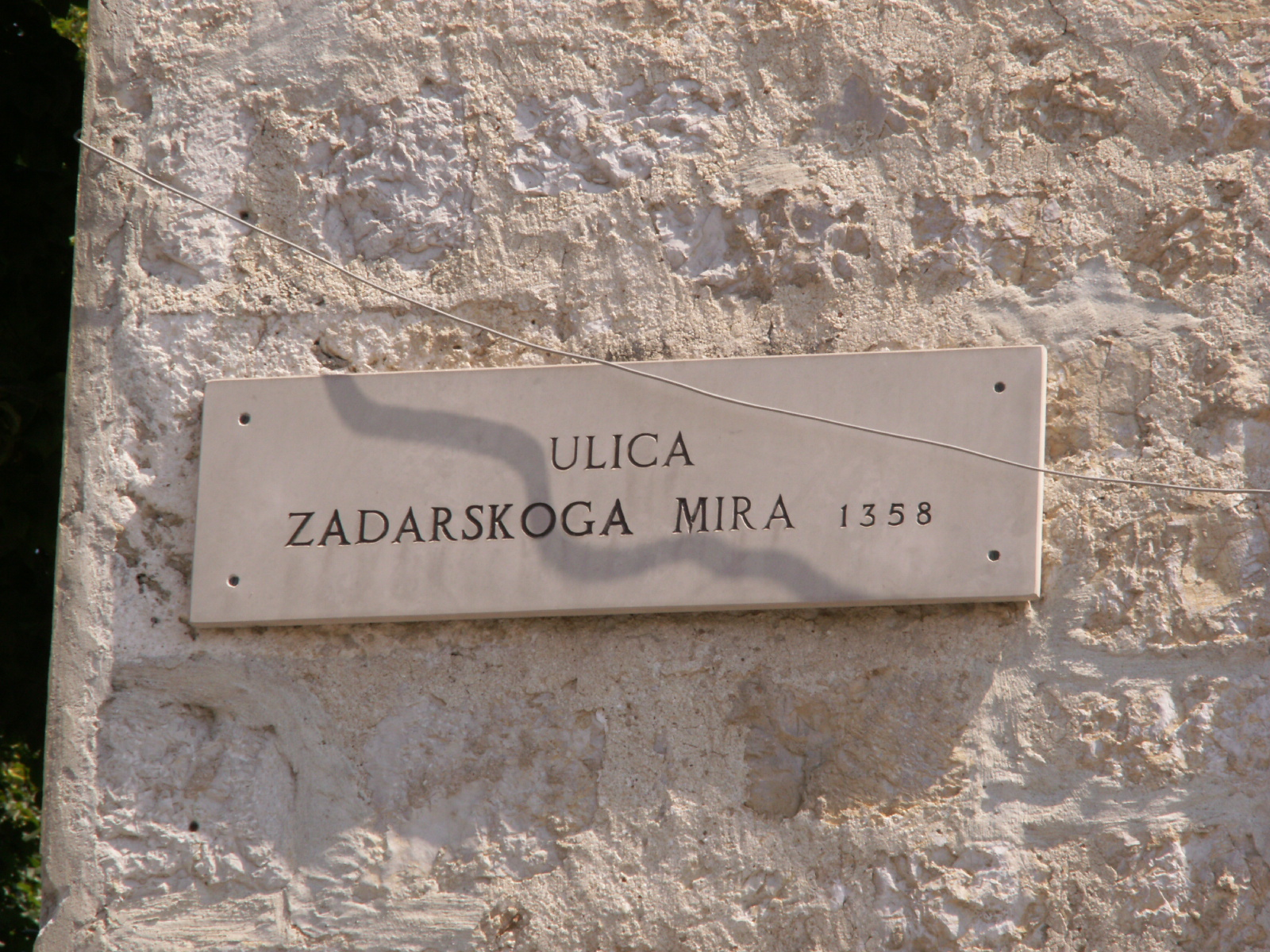 Az 1358-as zárai békéről elnevezett utca Zadarban